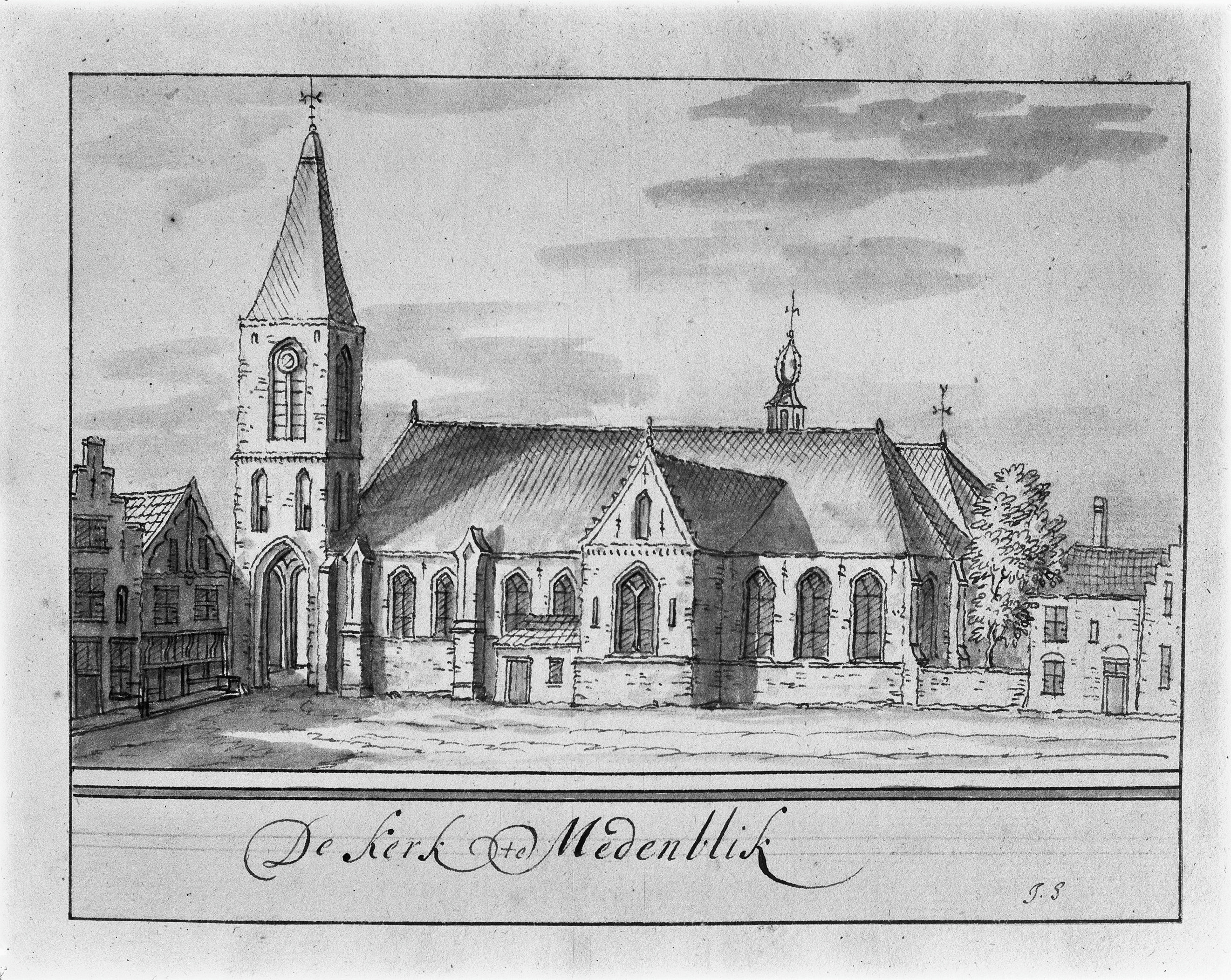 Hervormde kerk en Toren: kerk vanuit het zuiden